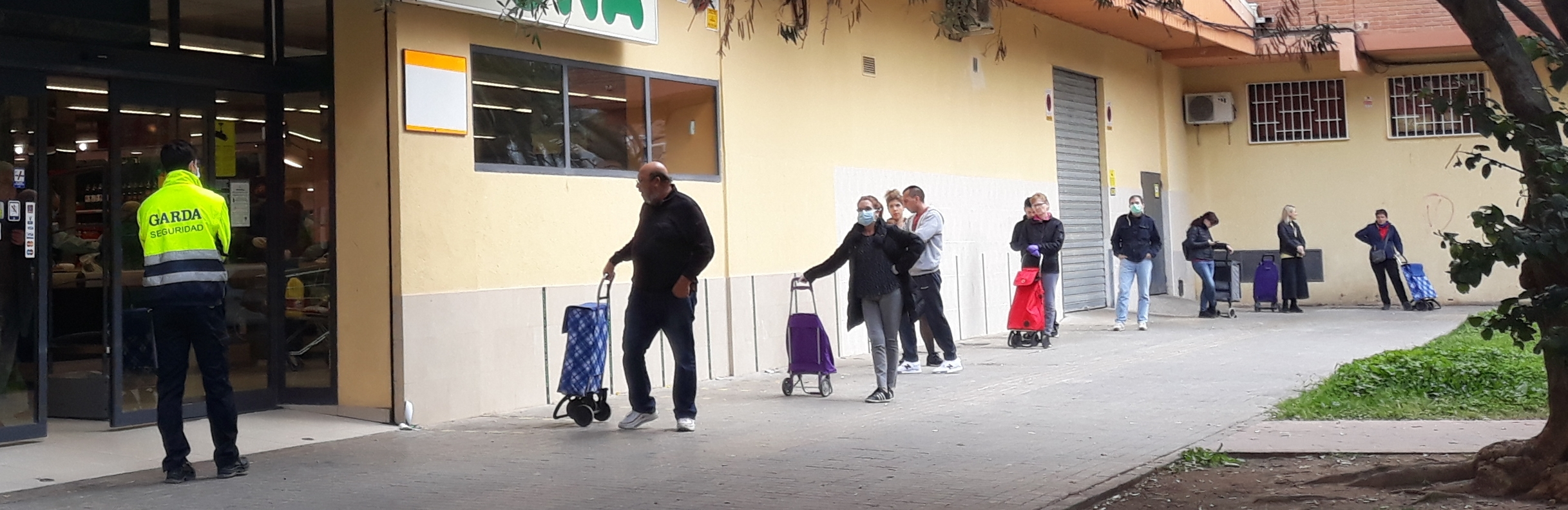 2020-03-Detalls i conseqüències del COVID-19 al País Valencià